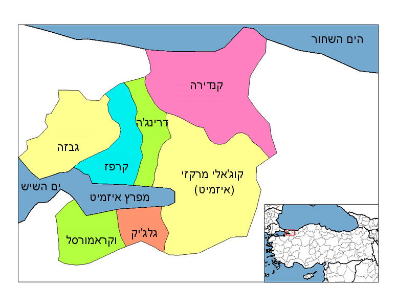 נפת קוג'אלי